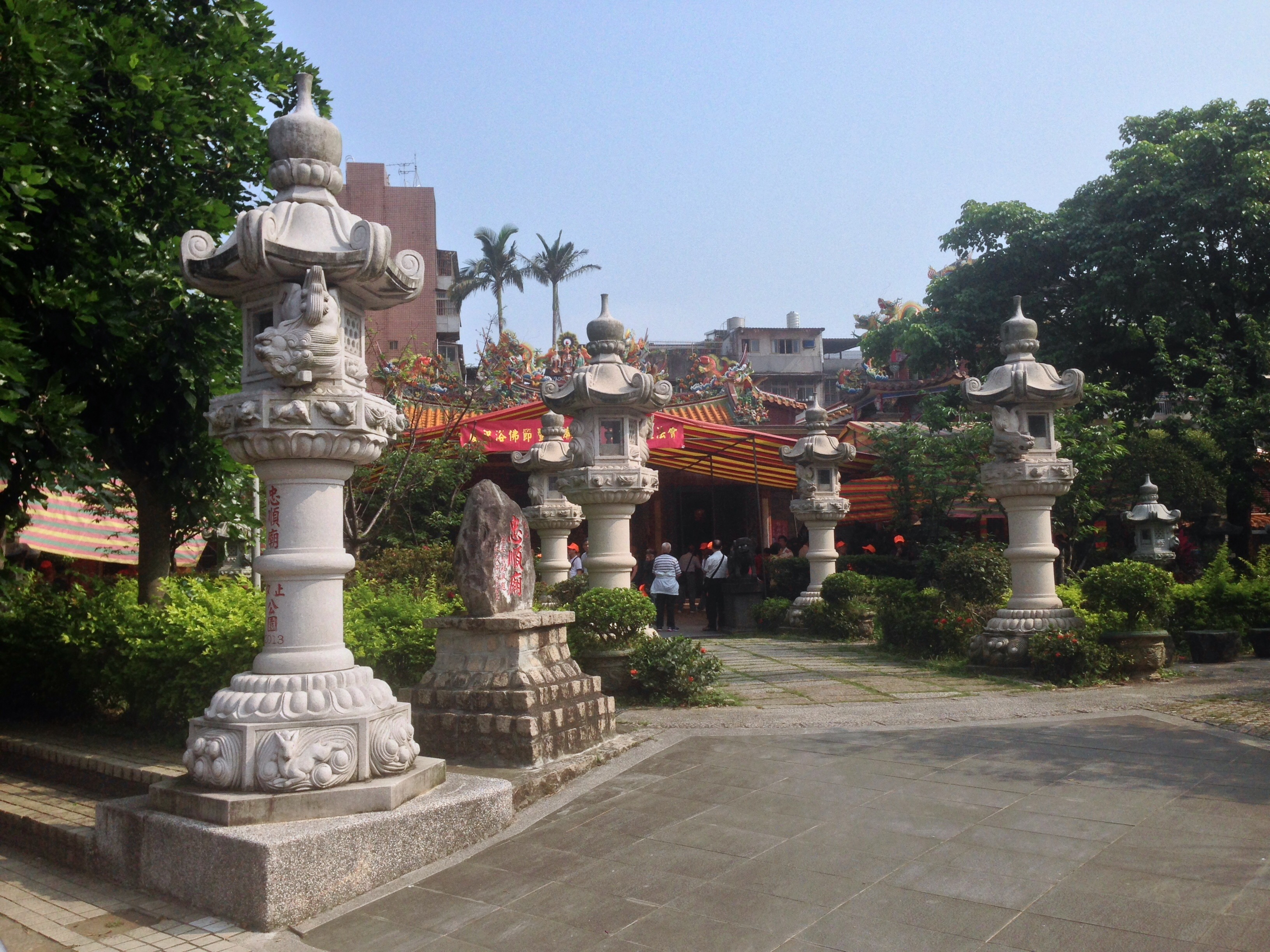 中文（台灣）: 汐止忠順廟